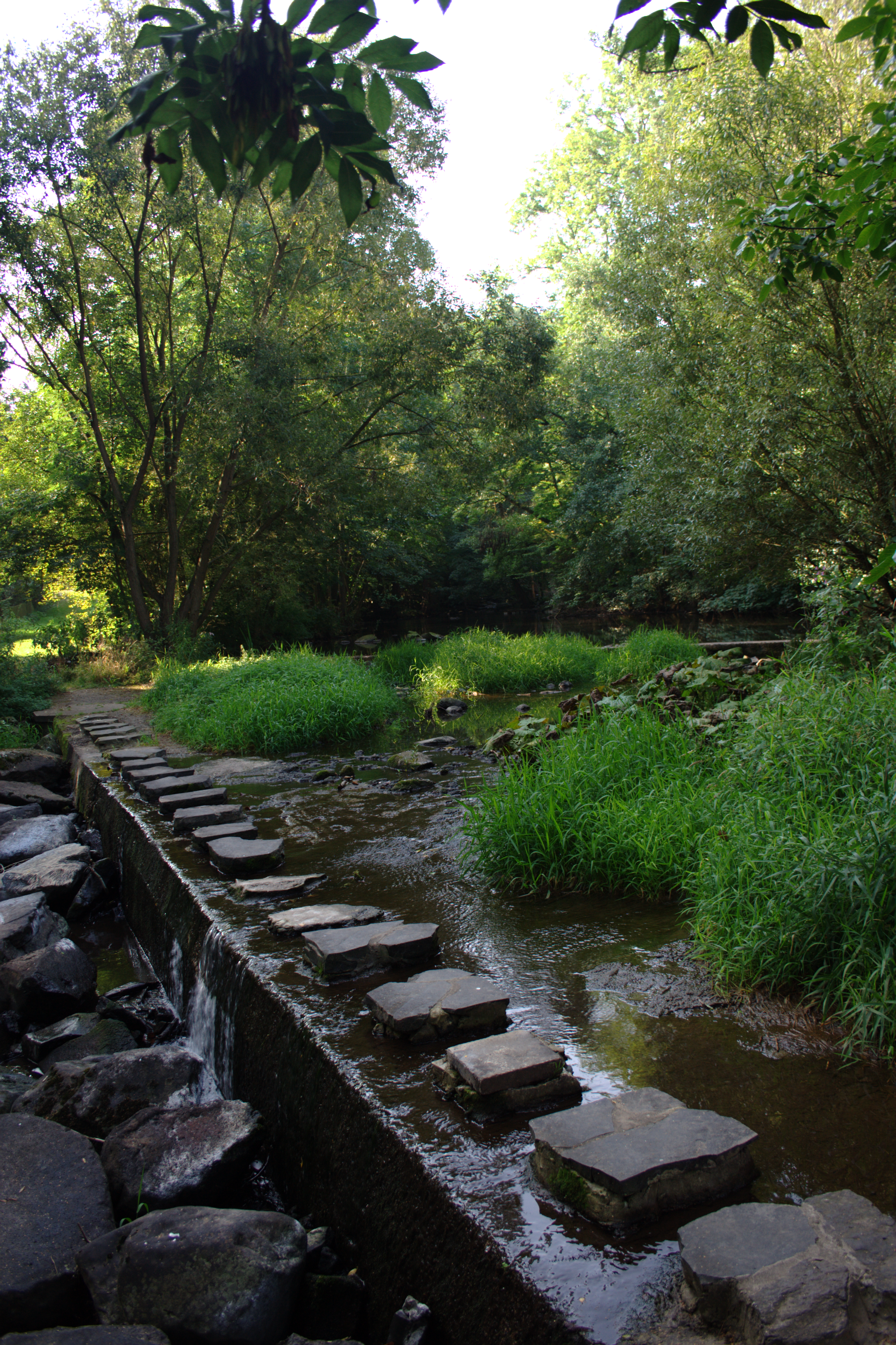 Weir with Step-stone bridge in Altenburg Germany Hesse Alsfeld